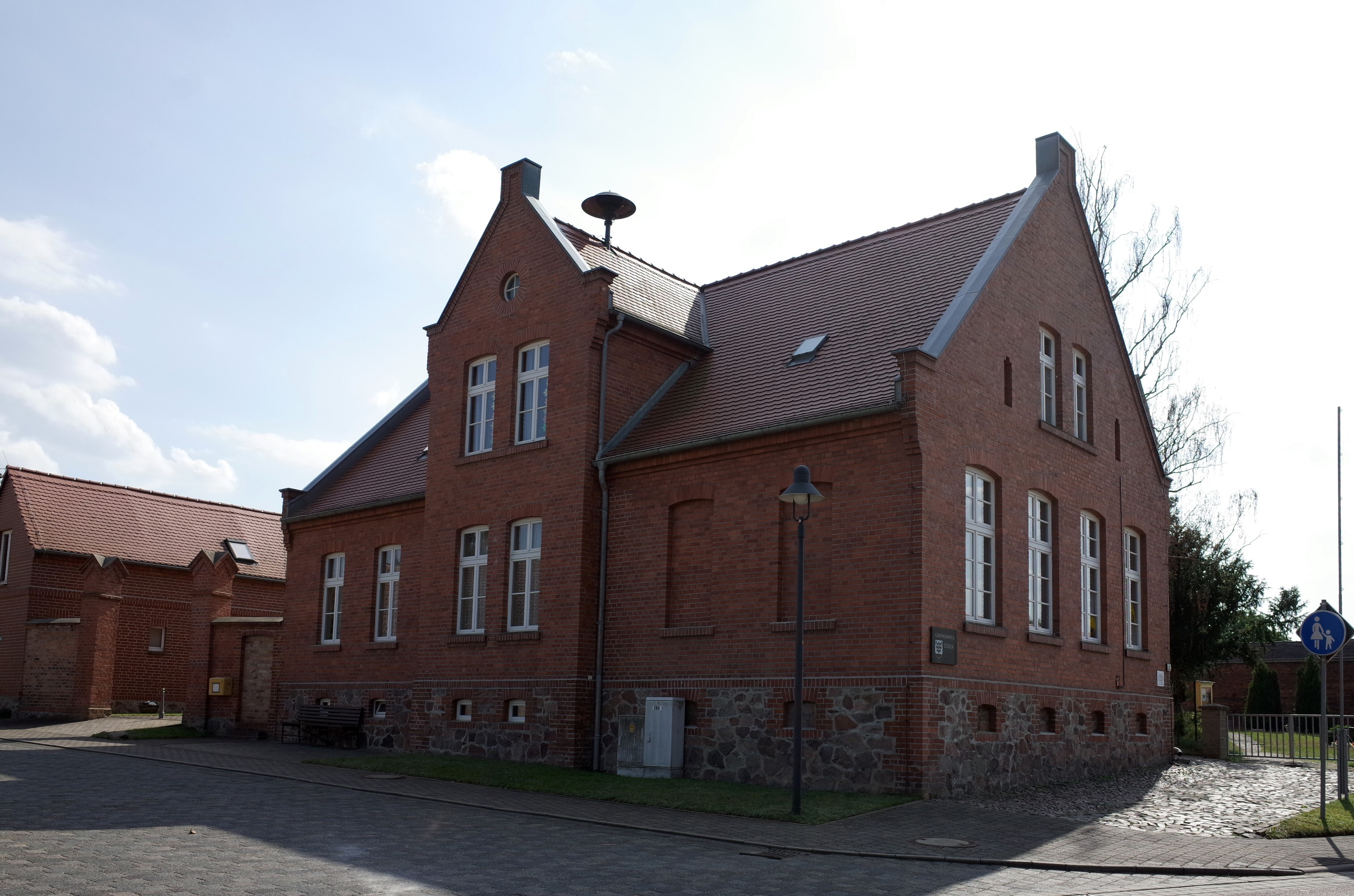 Coswig (Anhalt), Orsteil Düben, Dübener Dorfstraße 44, ehemalige Schule, Gemeindehaus (Kulturdenkmal im Denkmalverzeichniss Sachsen-Anhalt, Erfassungsnummer: 094 41024 000 000 000 000 [1])